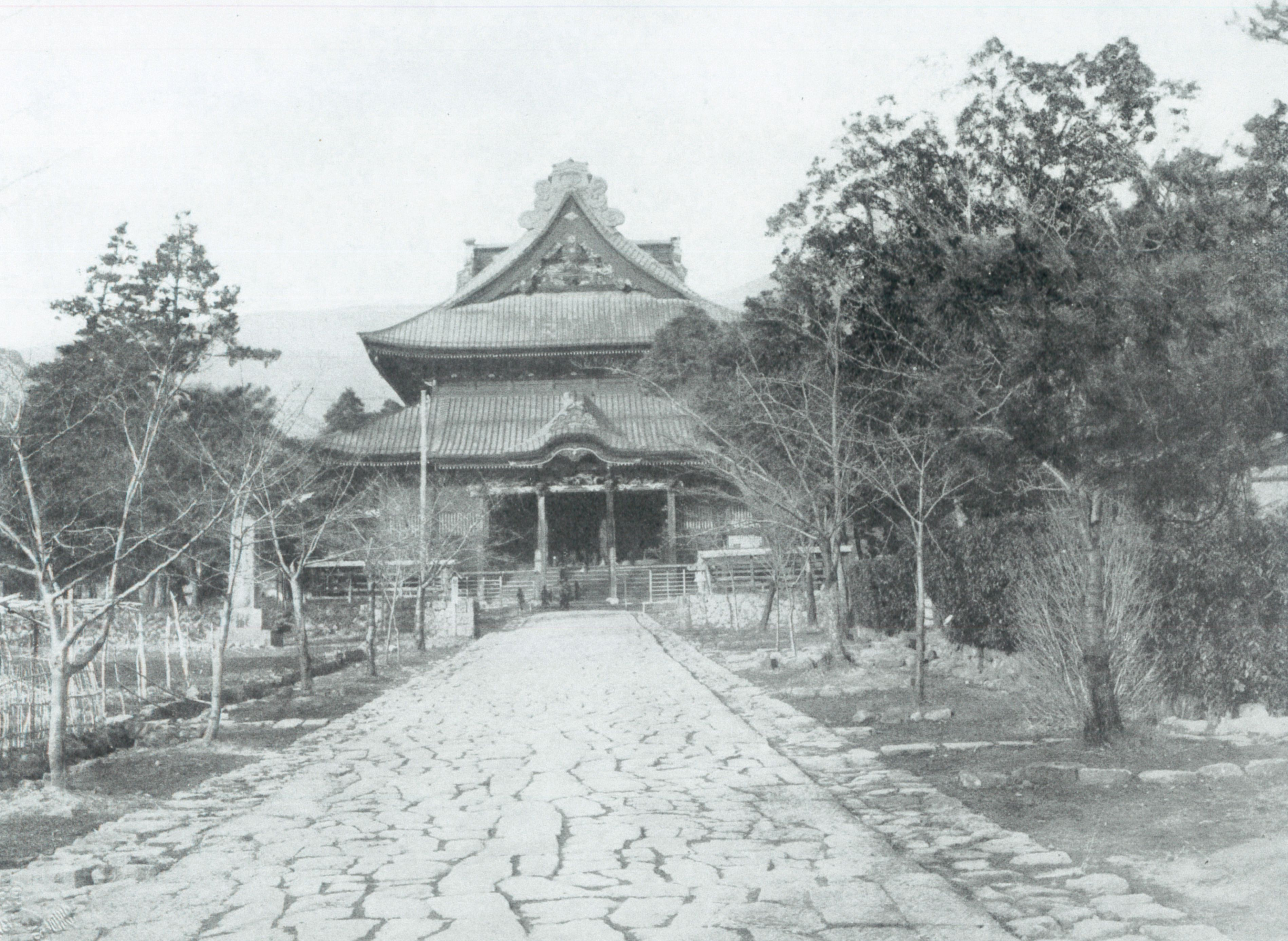 甲斐善光寺本堂